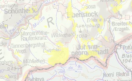 Der Große Kranichsee ist Teil des SPA-Gebietes (Vogelschutzgebietes) „Westerzgebirge“ und Kernstück des Natura 2000-Schutzgebietes „Erzgebirgskamm am Großen Kranichsee“. Hier in einer Darstellung des Bundesamts für Naturschutz, in Rot das Vogelschutz- und in Gelb (bei der Darstellung beider Gebiete weitgehend überlagert vom Rot des Vogelschutzgebietes) das FFH-Gebiet. [1], abgerufen am 12. September 2015. Nur das FFH-Gebiet – gelbe Fläche: [2], abgerufen am 12. September 2015